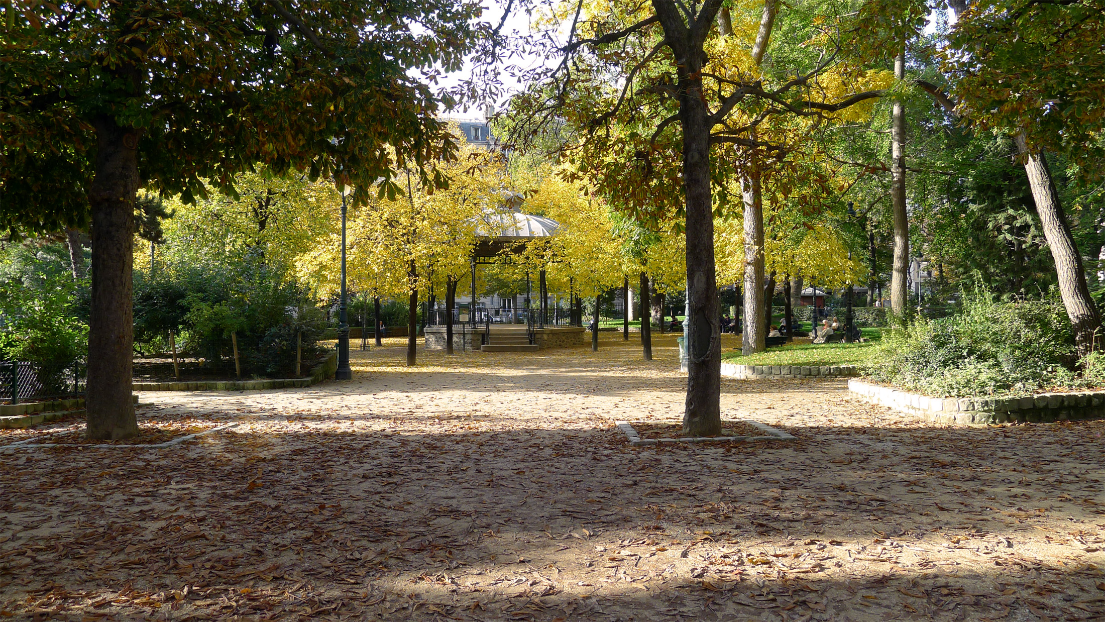 Square des Épinettes - Paris XVII